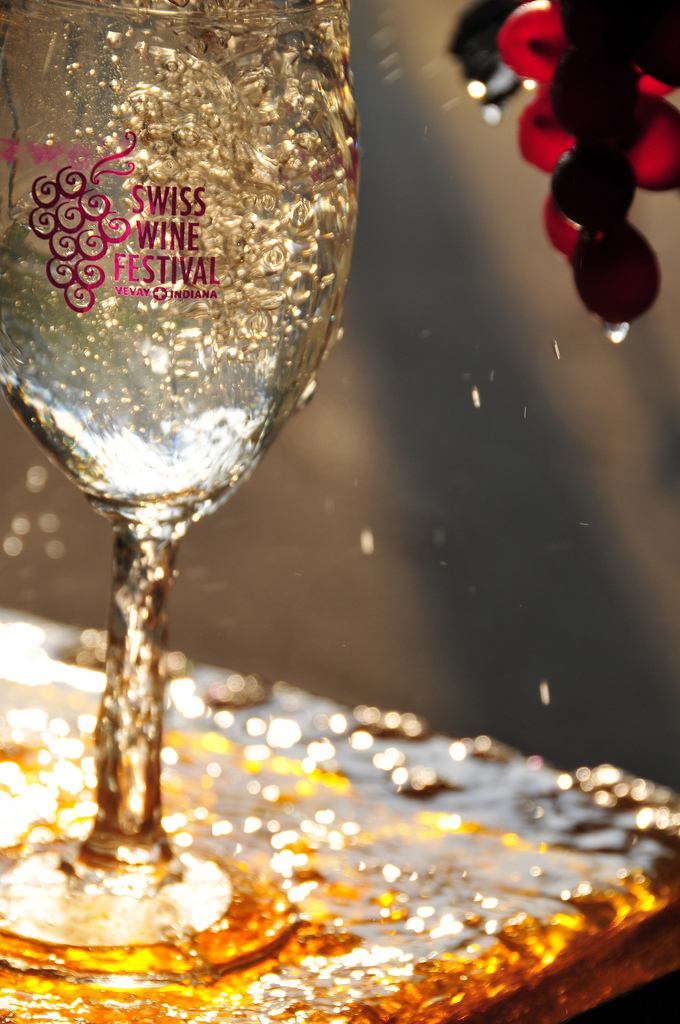 Flûte de vin blanc suisse